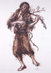 Franziskus, Aquarell, 1976, 46x64cm Franziskus (Franz von Assisi)